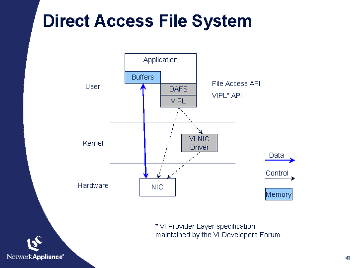 Монгол: шууд хандалт